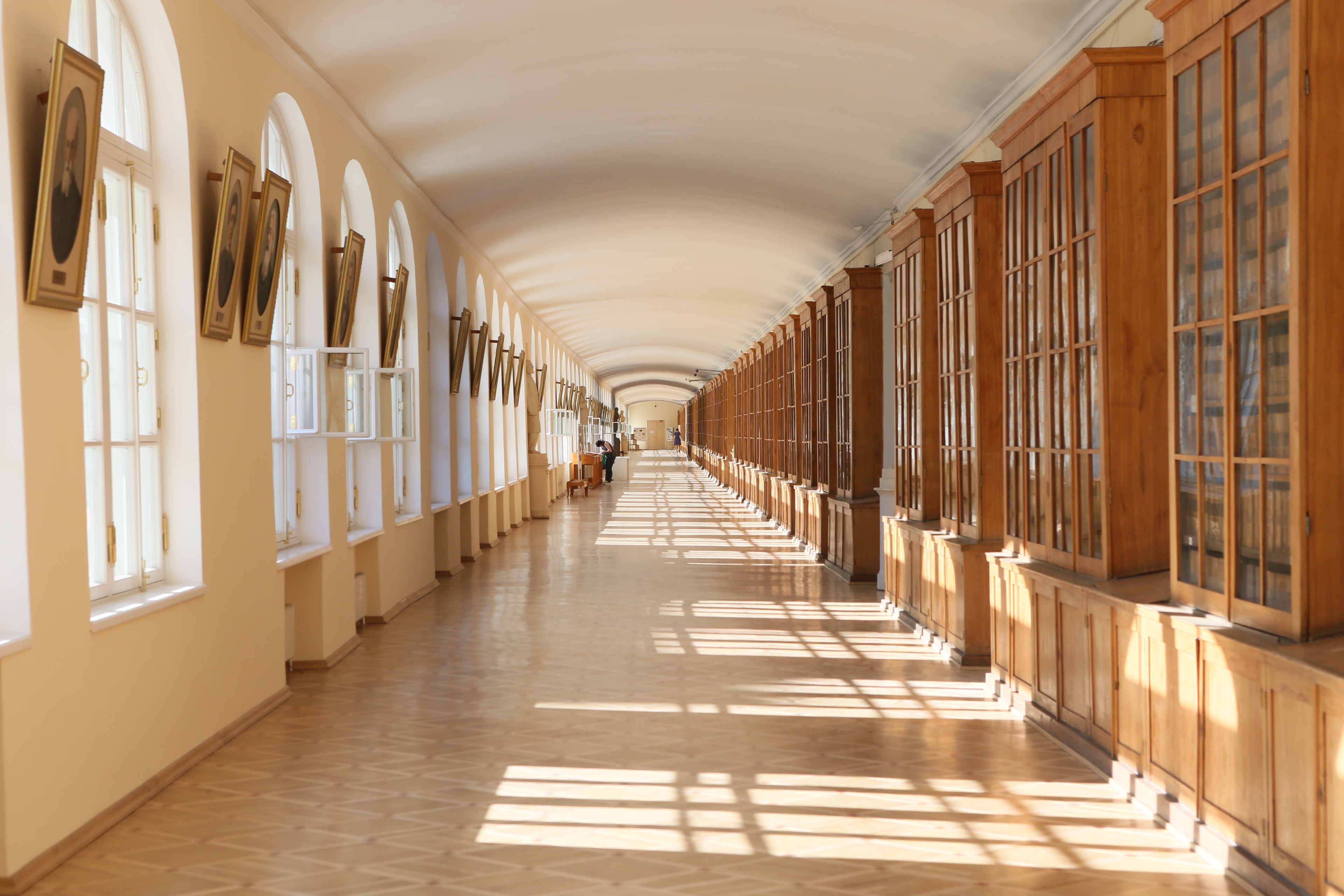 Коридор в здании Двенадцати коллегий